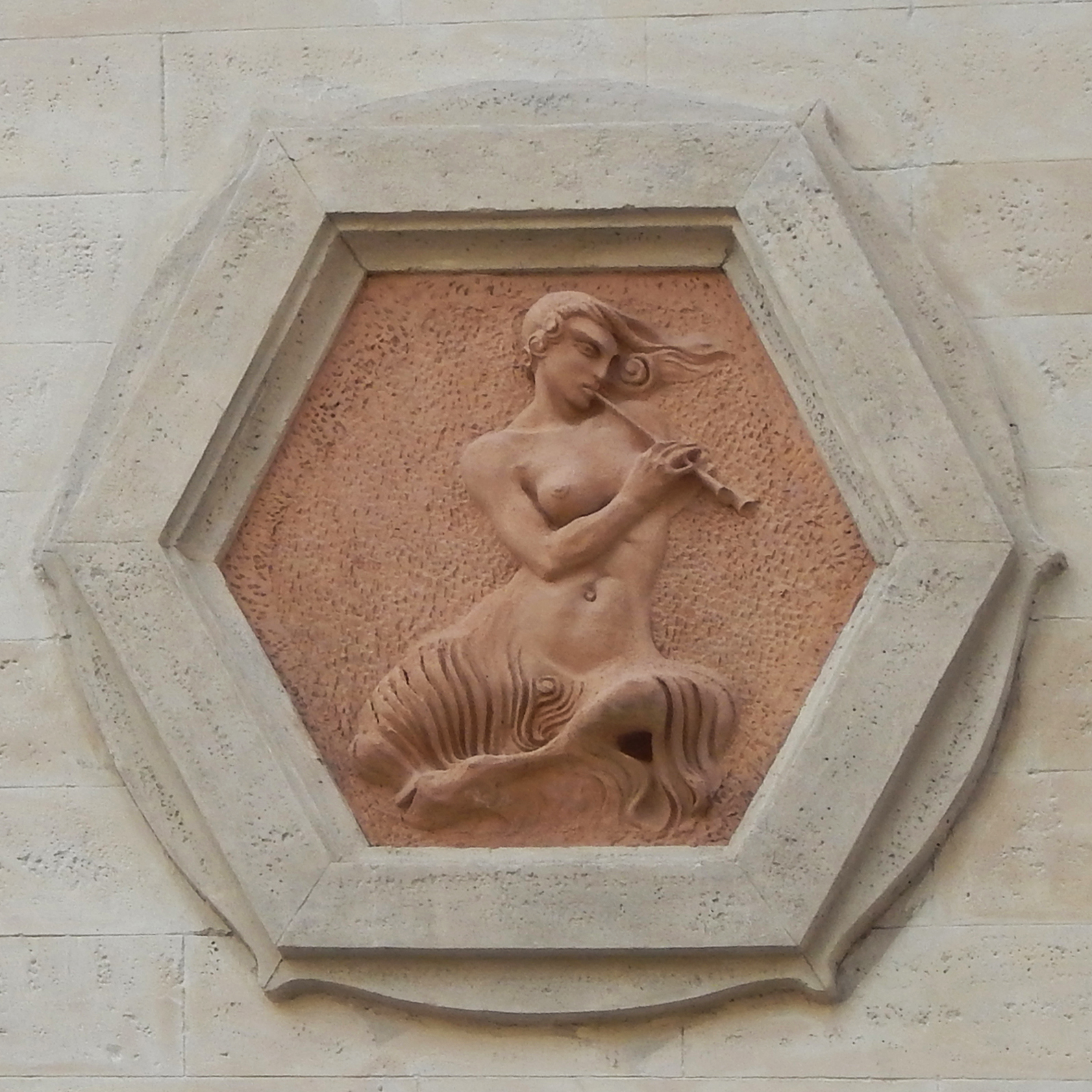 Formella in gesso sulla facciata dell'ex Cinema Olimpia ad Ascoli Piceno (da un originale in creta, circa 1922)